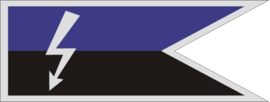 Proporczyk bdowWB